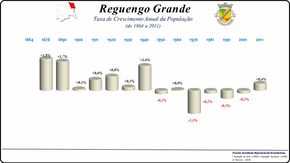 Evolução da População